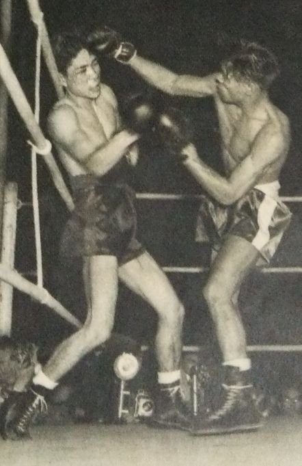 白井義男対レオ・エスピノザ